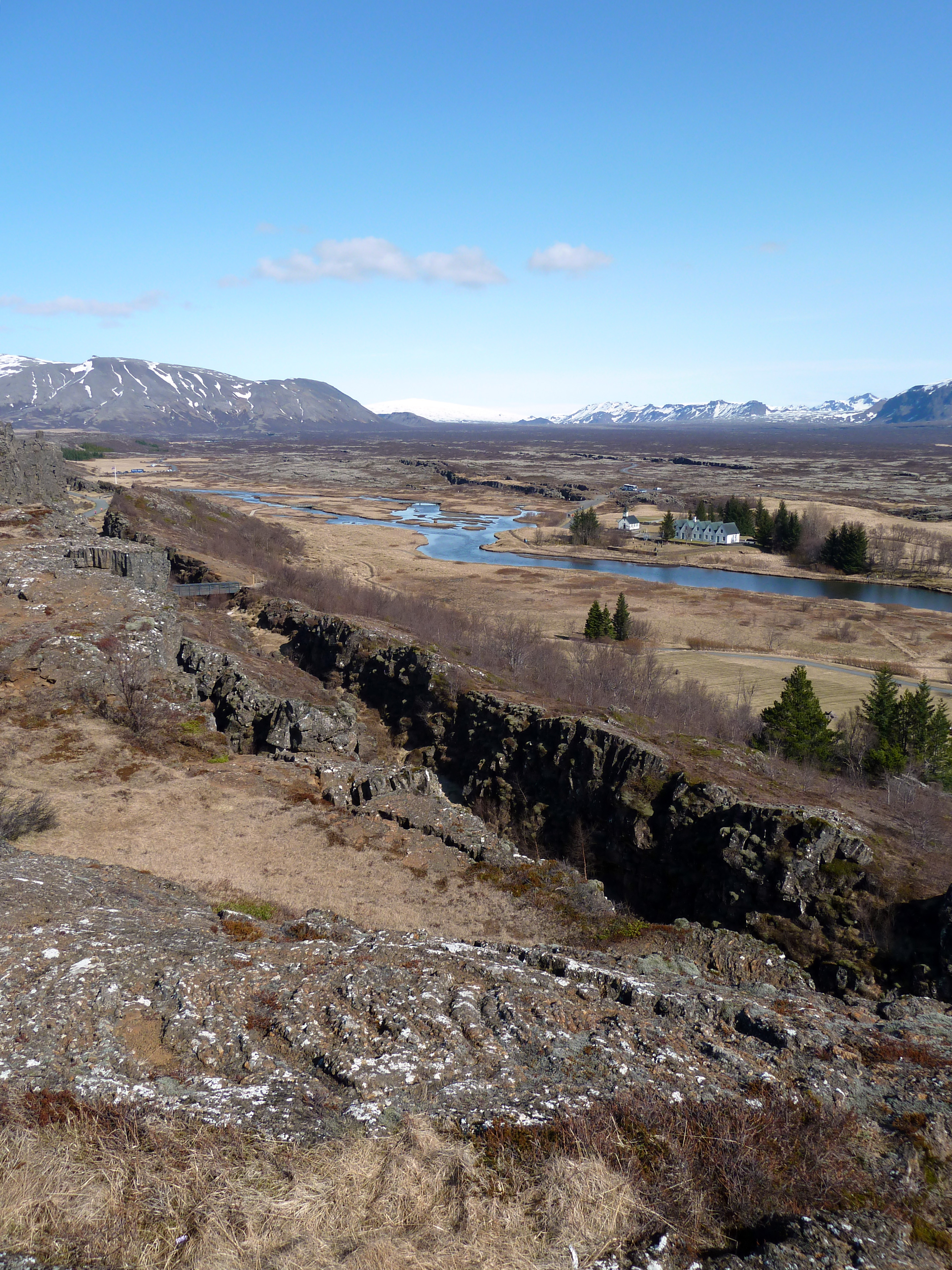 Þingvellir National Park, Bláskógabyggð